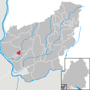 Schallbach, Landkreis Lörrach, Baden-Württemberg